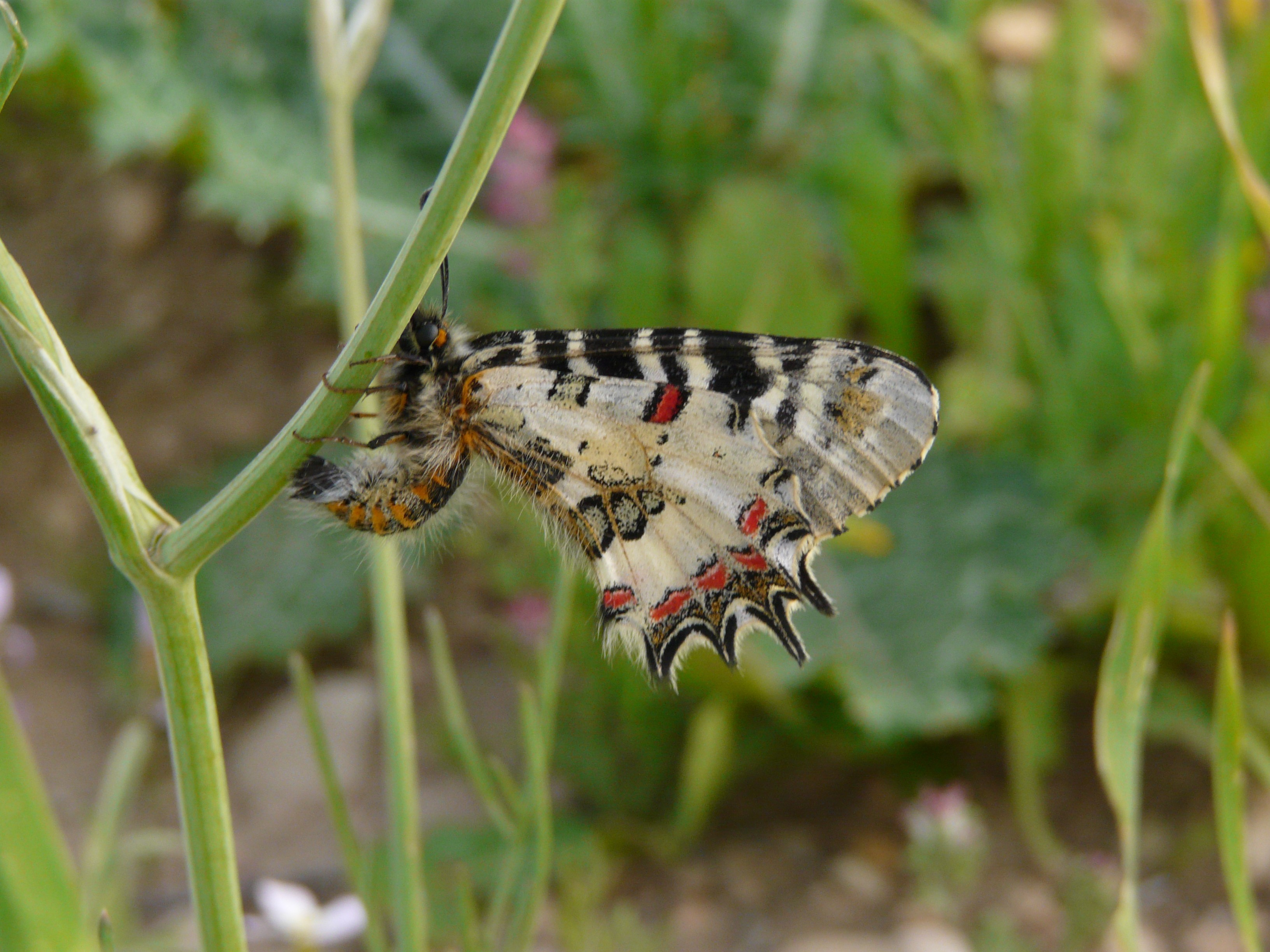 Allancastria deyrollei, Eastern Steppe Festoon, Jordan